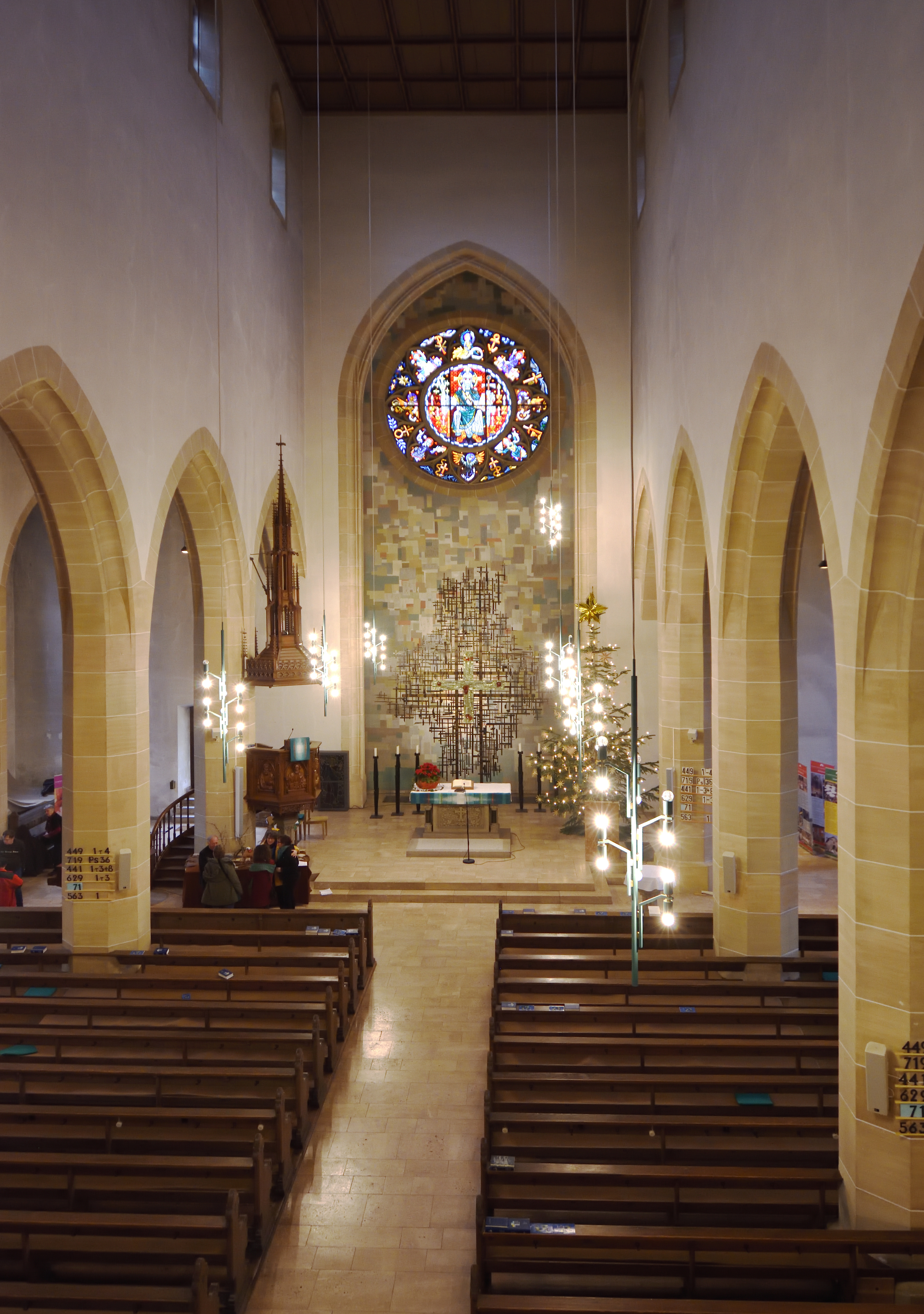 Stadtkirche Vaihingen an der Enz, Blick von der Empore zum Hauptaltar